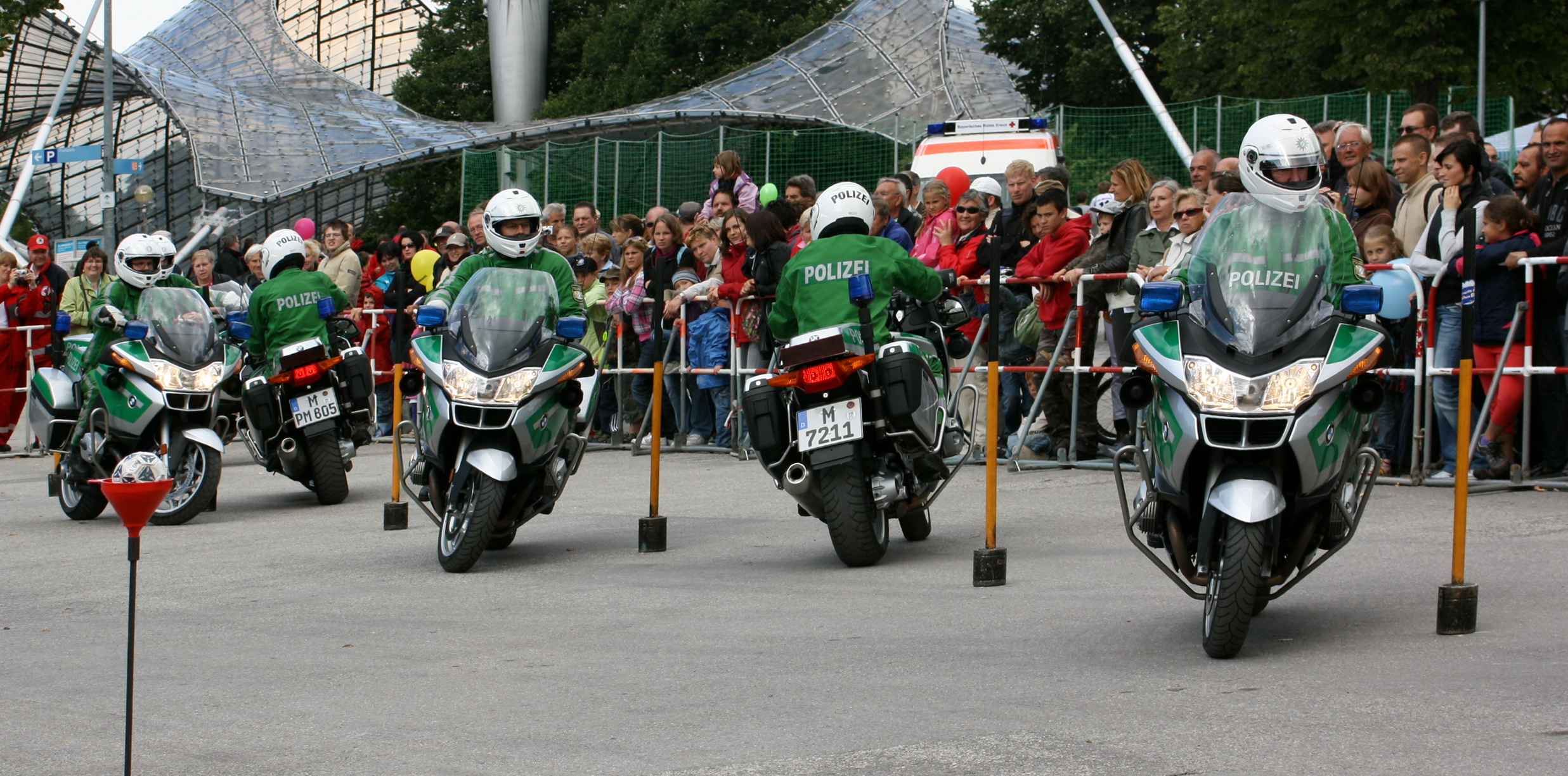 Gegenläufiges Slalom fahren mit Polizeimotorrädern der Bayrischen Polizei. BMW 1200. Am Tag der Courage im Olympiapark München.